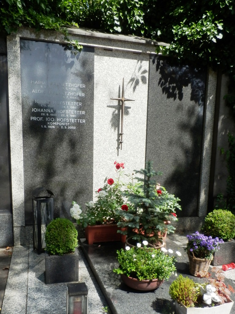 Grabstätte von Igo Hofstetter (Komponist), Barbarafriedhof Linz